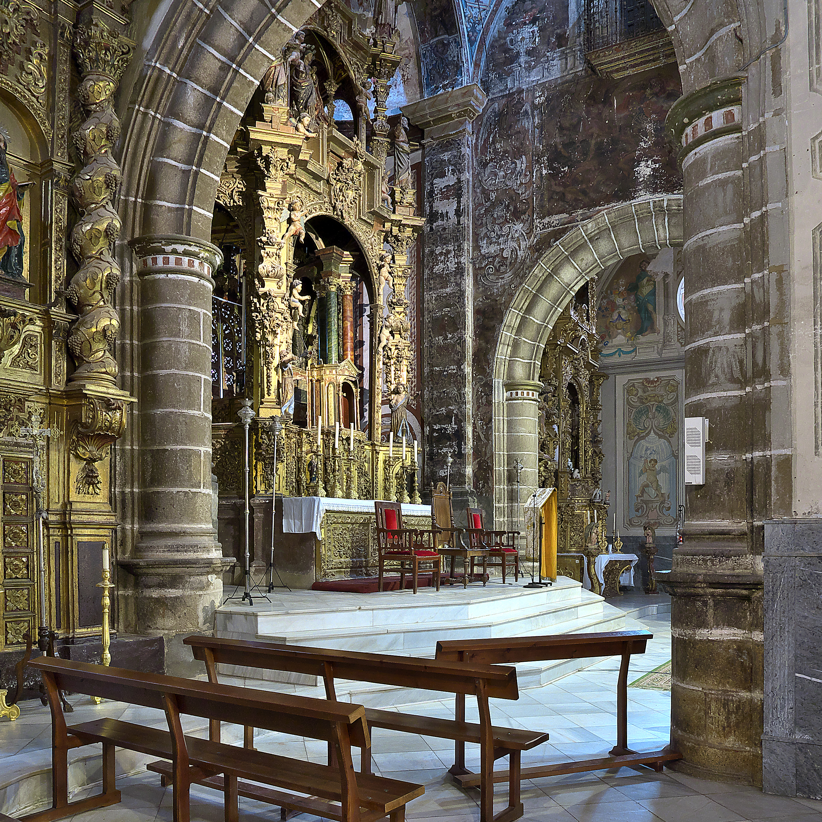 Presbiterio de la iglesia.